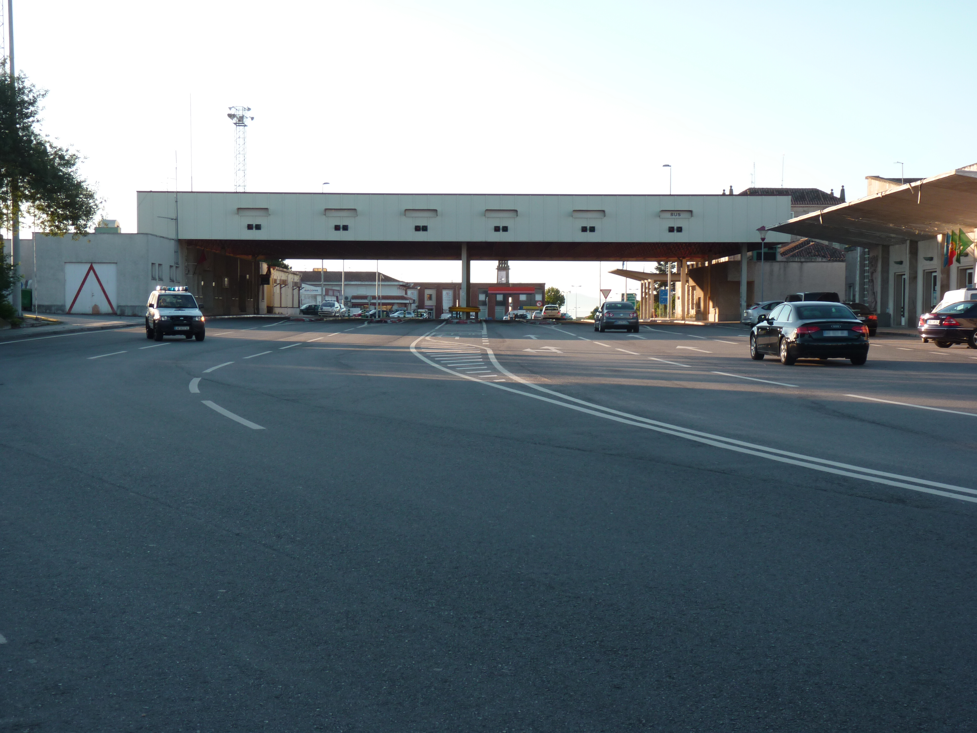 Fronteira de Vilar Formoso.